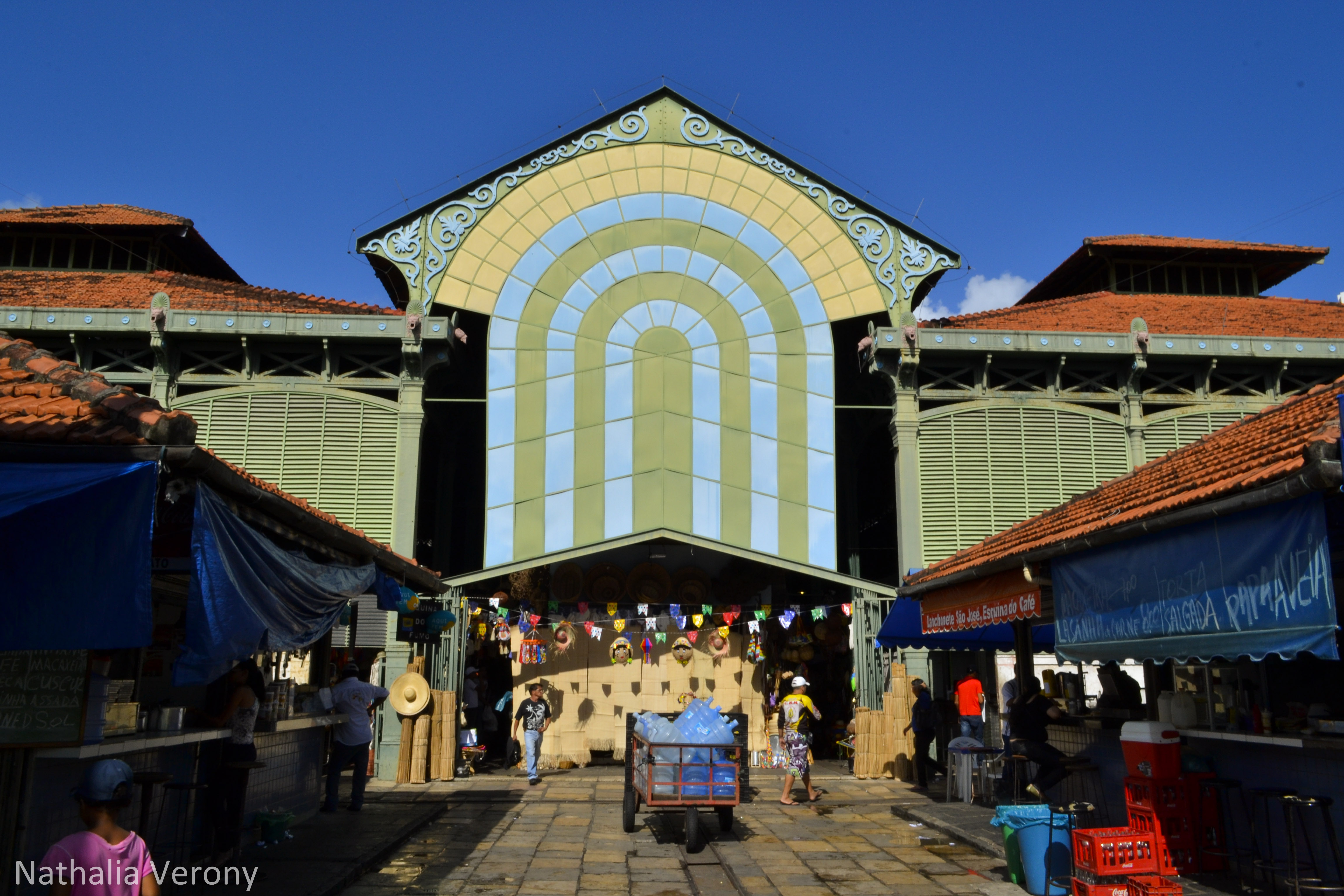 Mercado de são José - Recife -Pernambuco